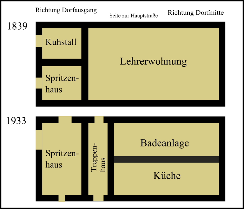 Schematische Zeichnung zur Lage des Spritzenhausraums im Erdgeschoss der alten Lösnicher Schule von 1839.